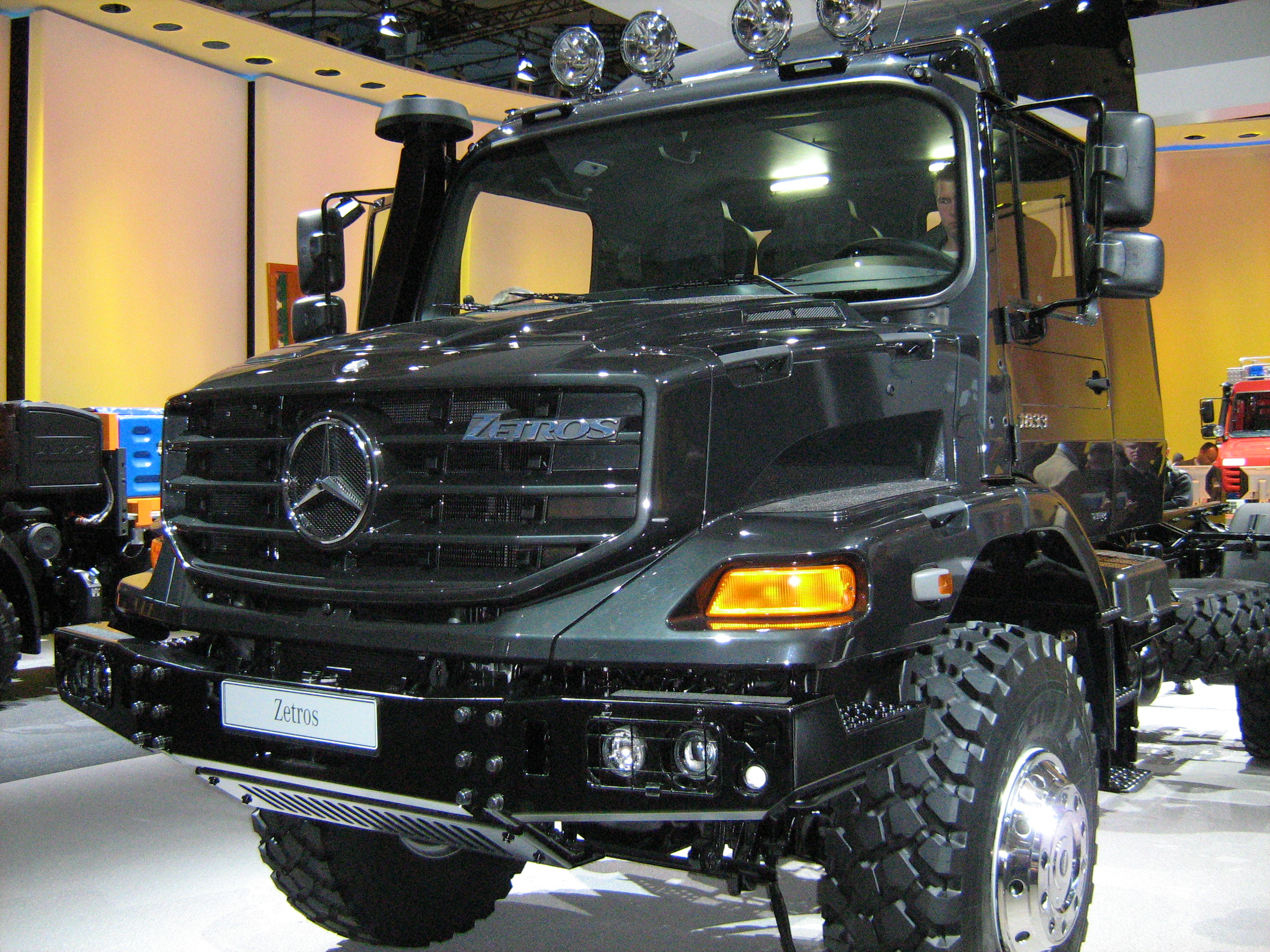 Mercedes-Benz LKW Typ: Zetros auf der IAA 2008.